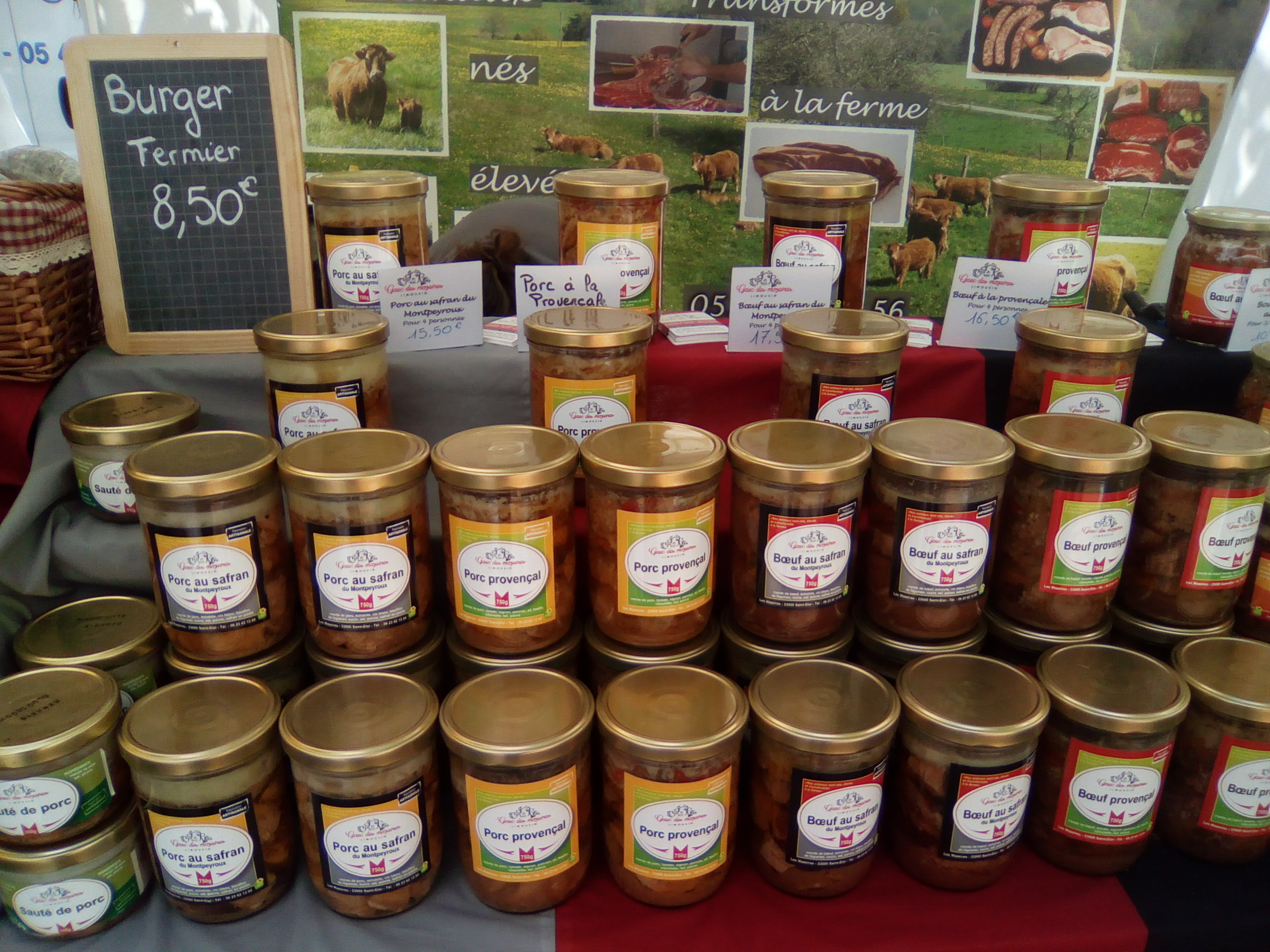 Marché des producteurs de pays boulevard de Reuilly.